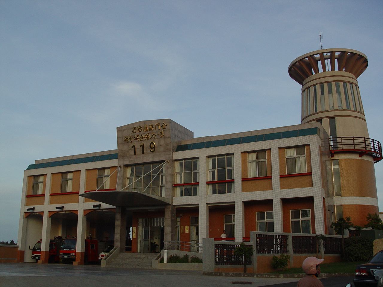 金門縣消防局金城分隊，位於中華民國福建省金門縣金城鎮西海路三段43號。